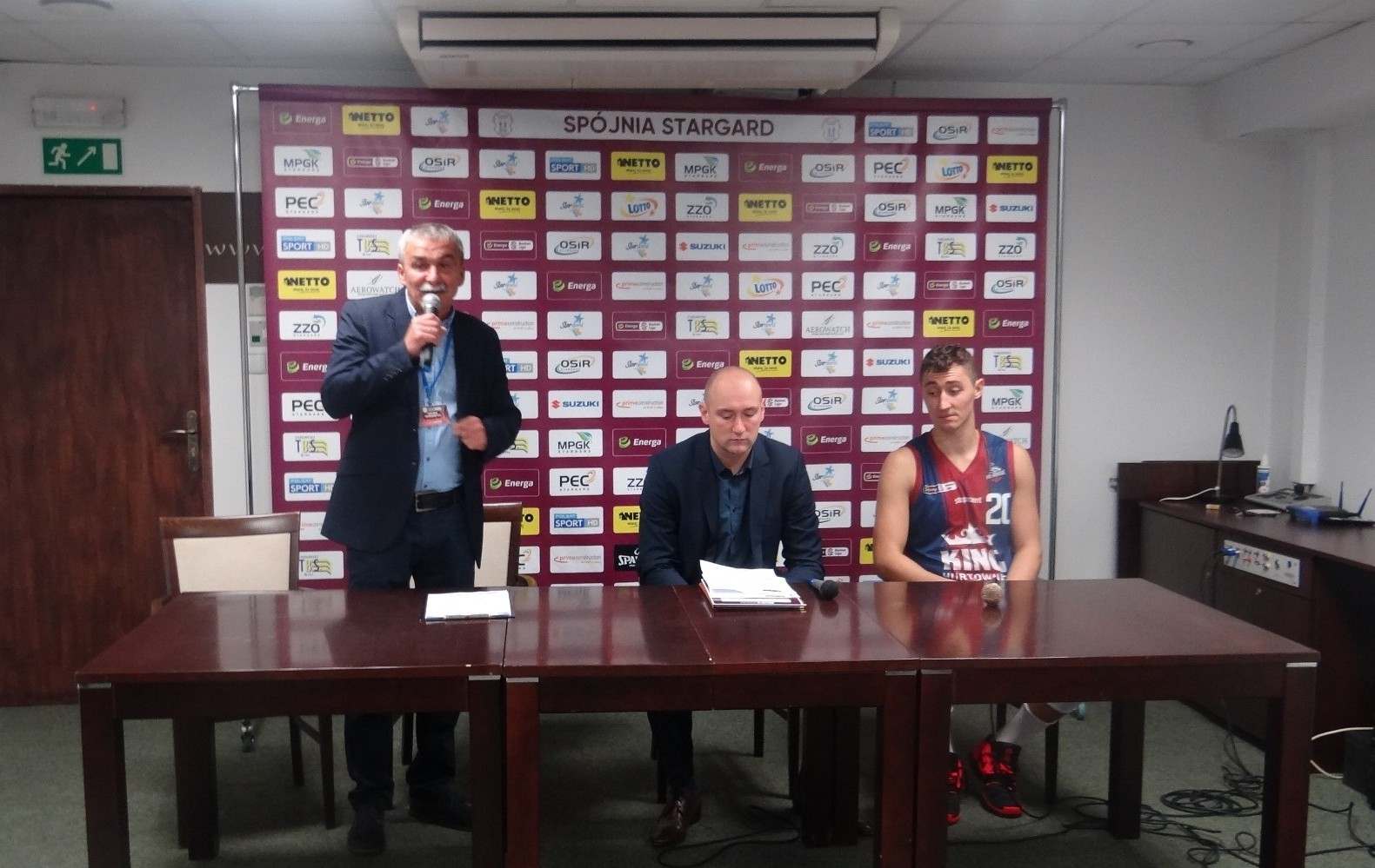 Stargard, 06.10.2018r. Konferencja prasowa